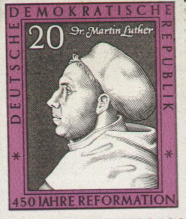 Почтовая марка ГДР